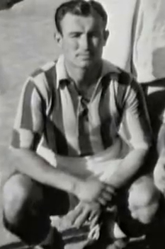 Nikos Godas Νίκος Γόδας, ποδοσφαιριστής του Ολυμπιακού, και αγωνιστής της Εθνικής Αντίστασης. Εκτελέστηκε το 1948 φορώντας τη φανέλα του Ολυμπιακού (αυτή ήταν και η τελευταία του επιθυμία)